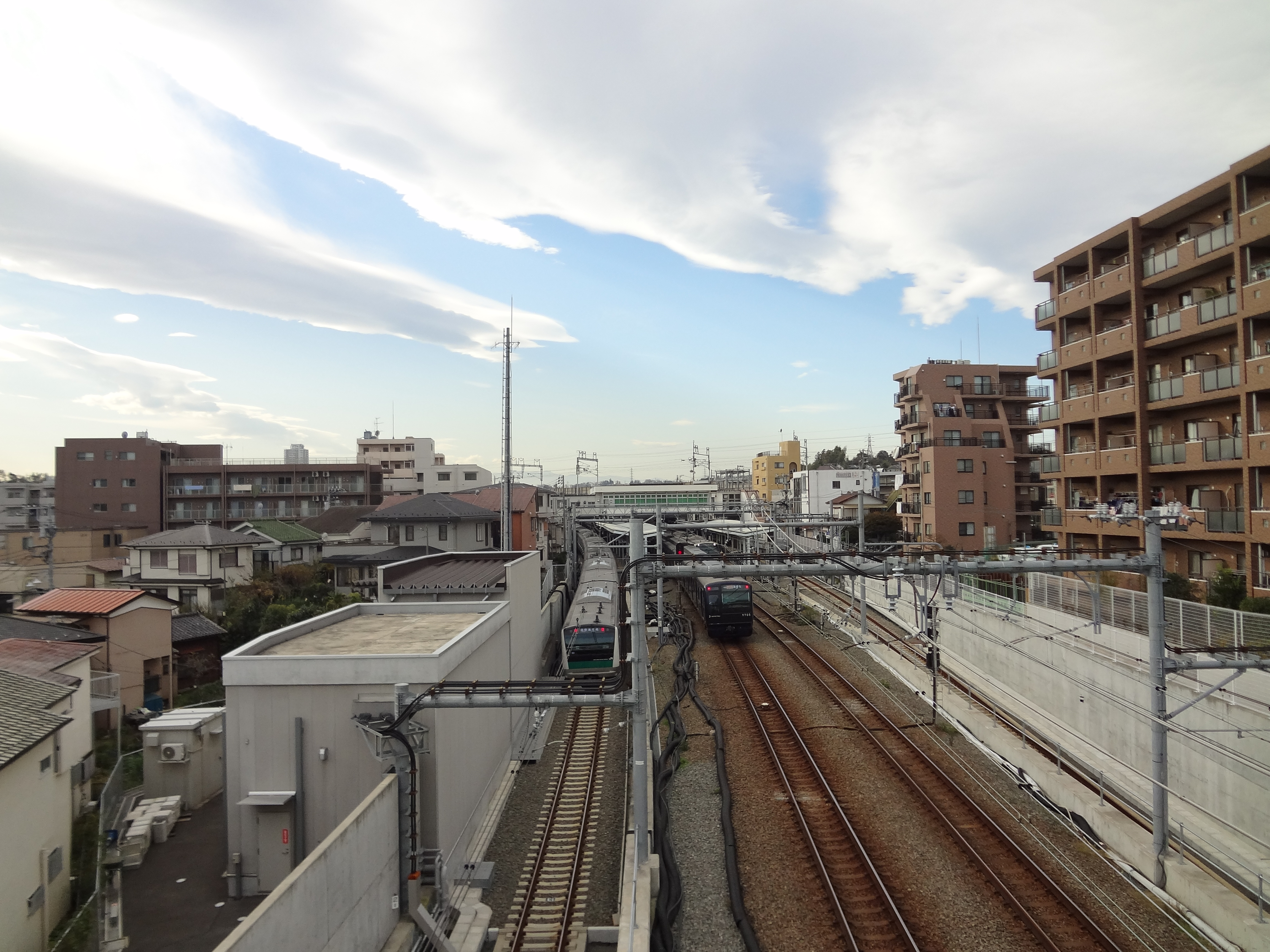 新宿・横浜方からの同時入線